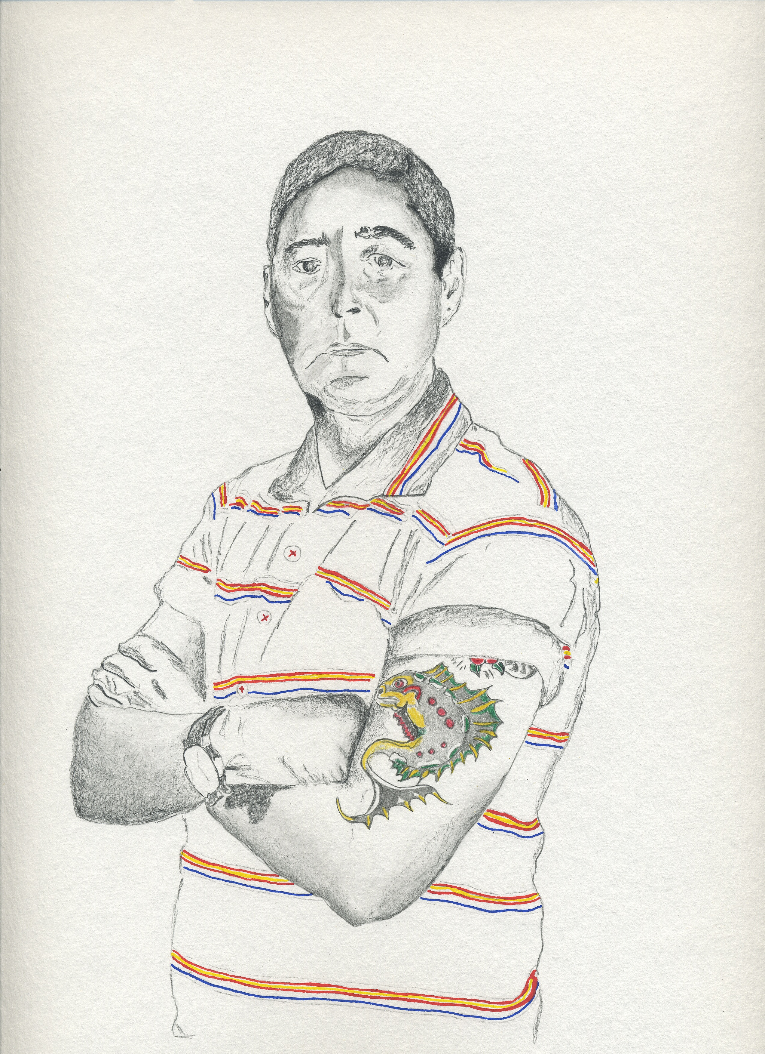 portrait aux crayons et aux feutres 2017.